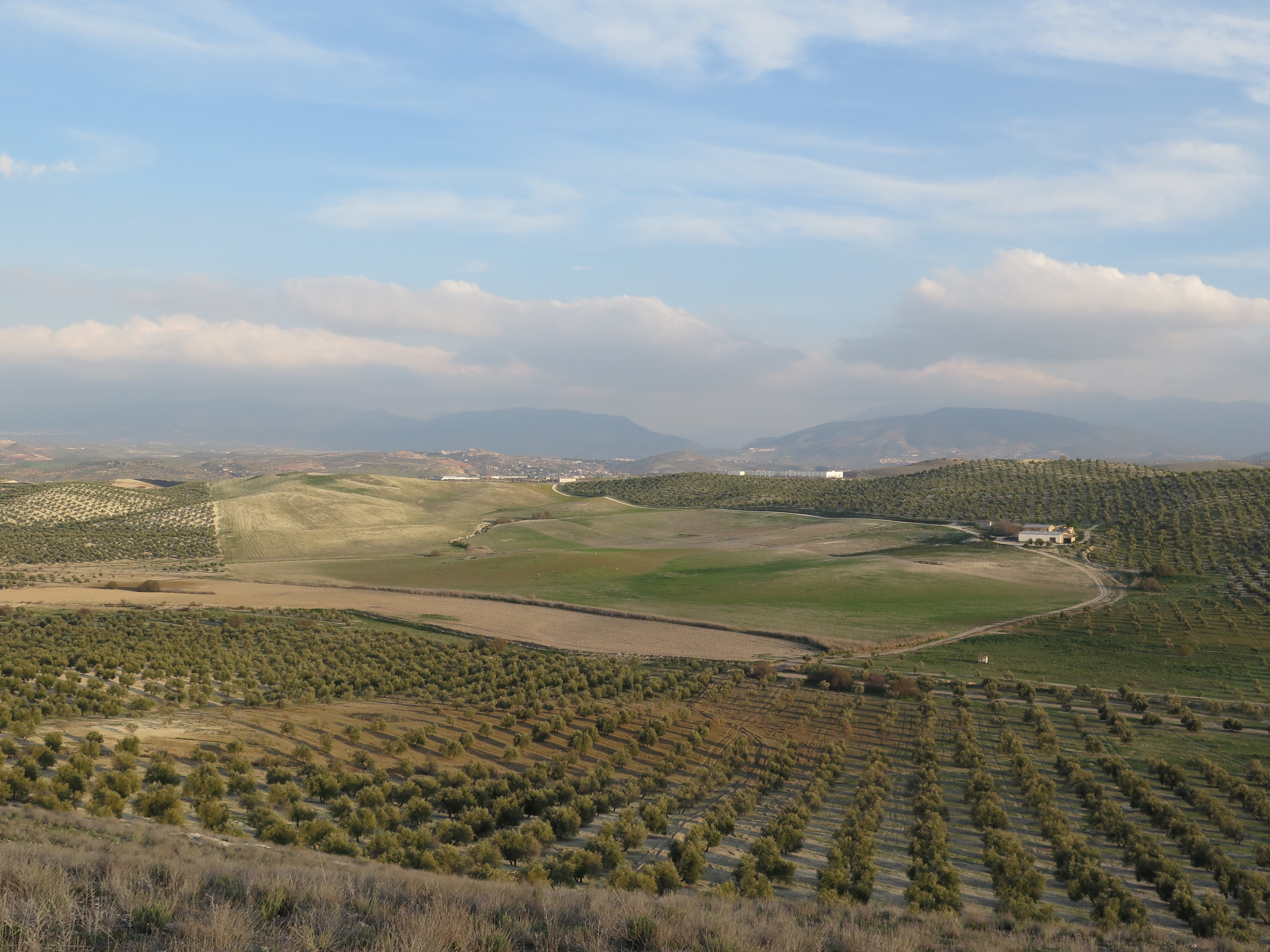 Vista de la campiña Norte de Jaén, desde la Cuerda de Cabanillas.